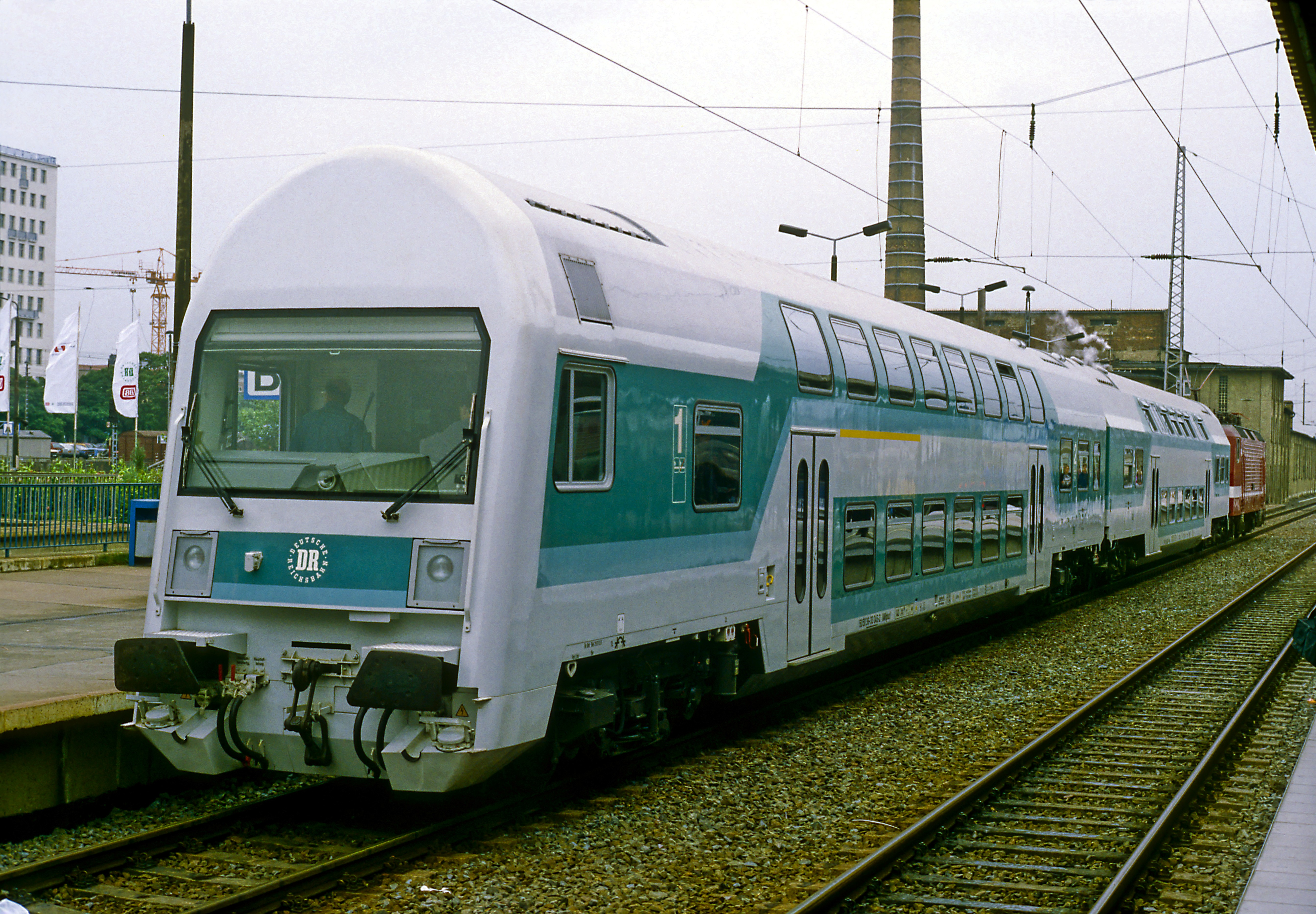 Fahrzeugausstellung im Hauptbahnhof Magdeburg anlässlich der Eröffnung des ICE-Betriebes zwischen Hannover und Berlin über Magdeburg. Die Wendezüge zwischen Magdeburg und Braunschweig waren ebenfalls neu.